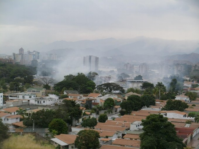 san jacinto